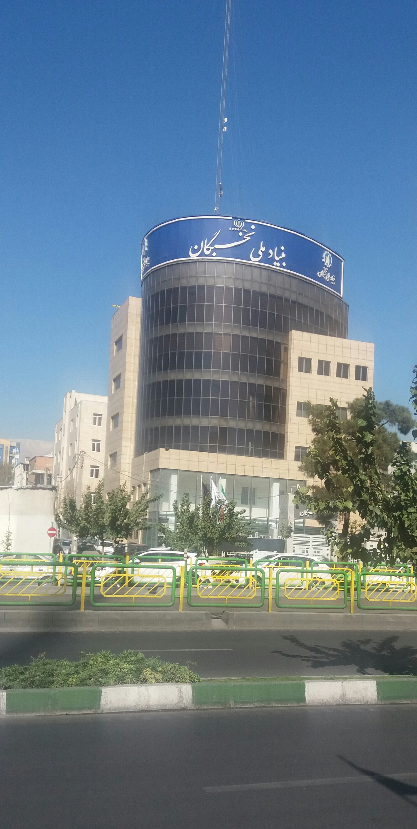 بنیاد ملی نخبگان، ایران - آبان ۱۳۹۵